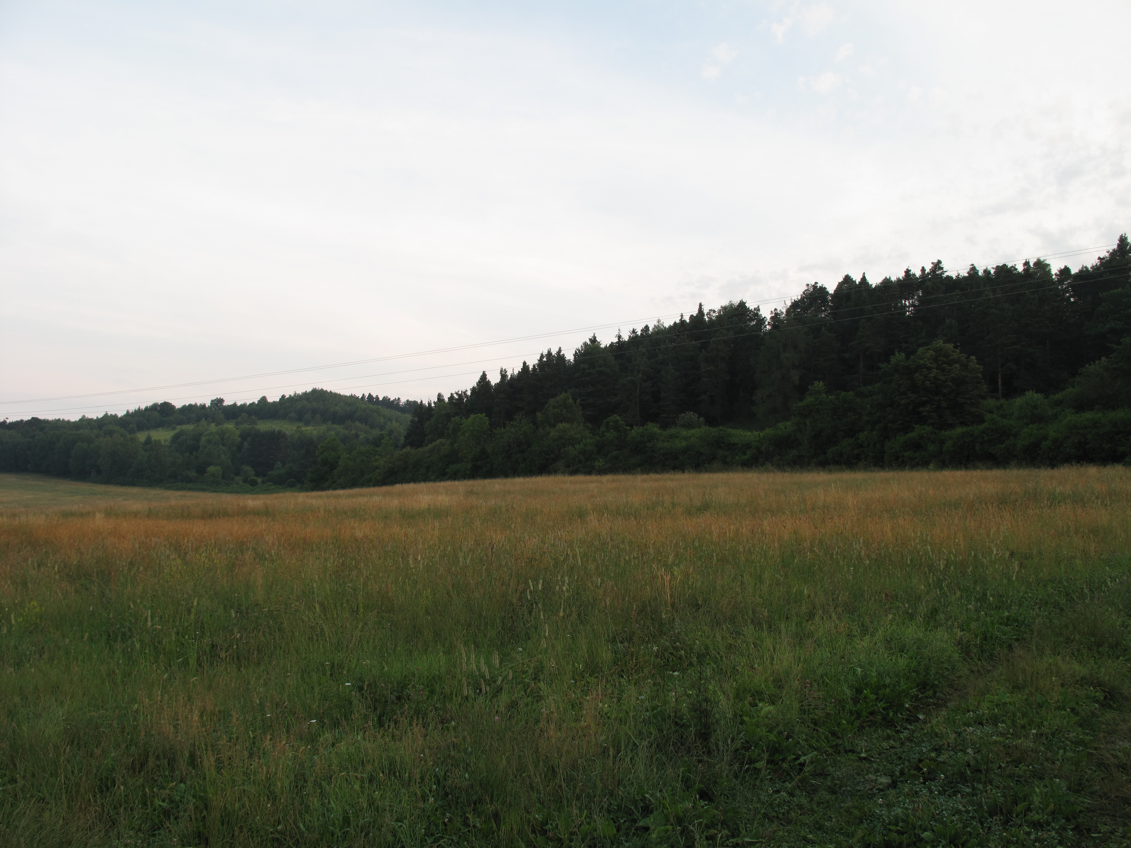 Přírodní památka Výří vrch. Okres Český Krumlov, Česká republika.